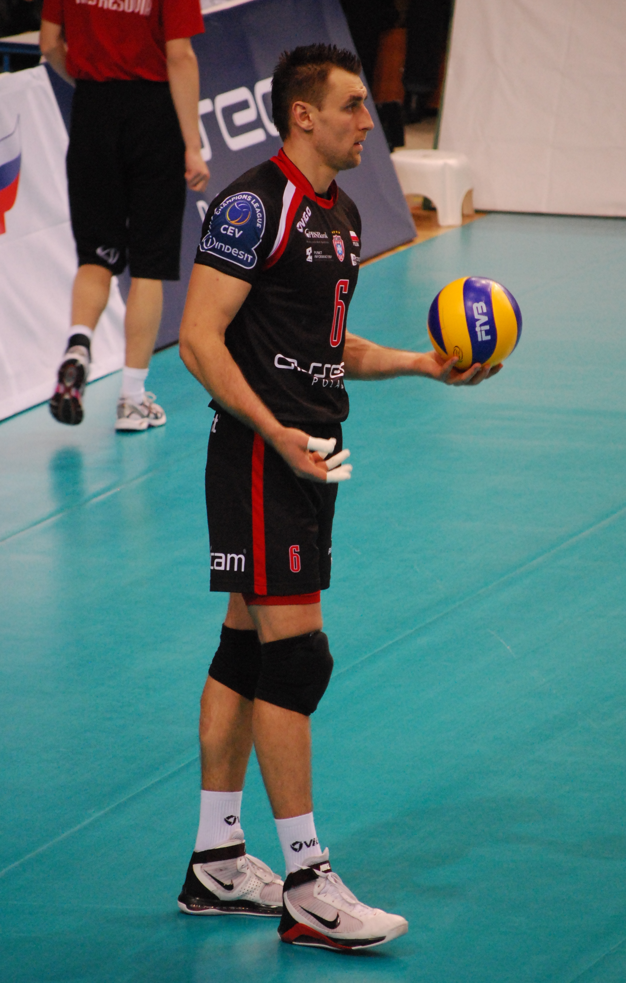 Marcin Wika